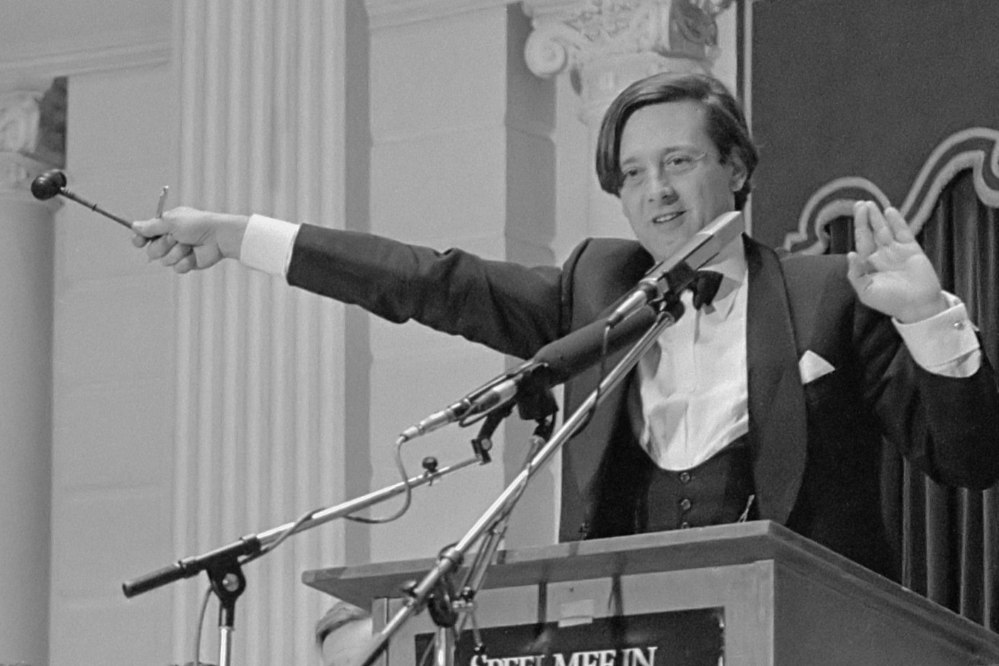 Benefietveiling voor Concertgebouw; veilingmeester Van Glerum in actie op het podium 26 maart 1985